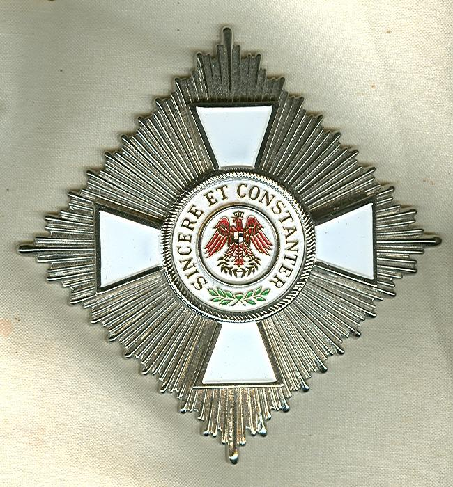 Eigen collectie. Een scan van een redelijke na-oorlogse copie. Wel geschikt als illustratie van de tekst. Robert Prummel 13 jun 2006 16:26 (CEST)